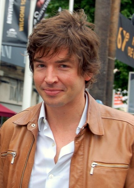 Cédric Oheix au festival de Cannes